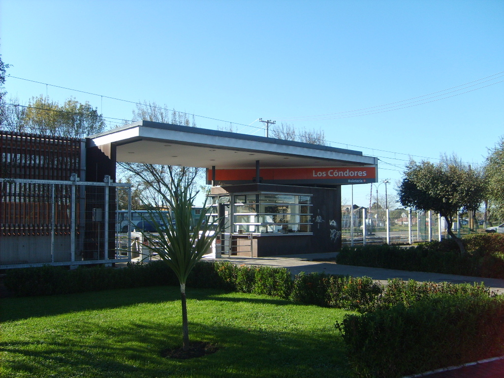 Los Cóndores (estación)